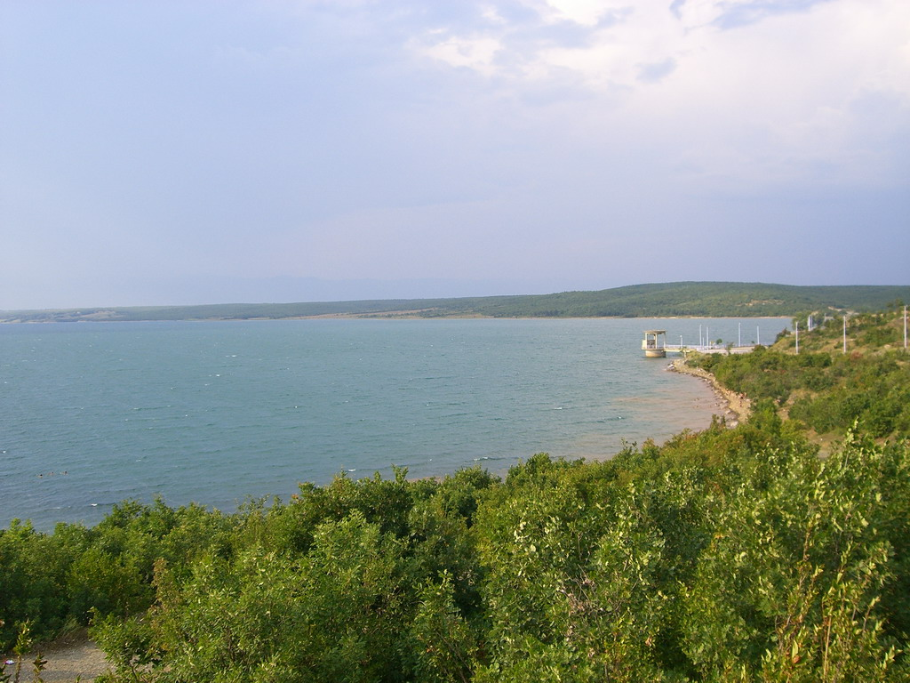 Radonjićko Lake, Serbia